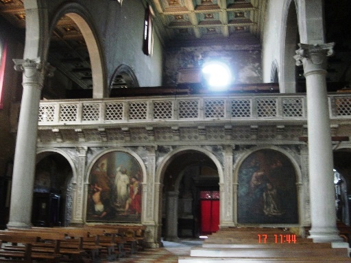 Cathédrâle de San Cristoforo sur l'île de San Michele à Venise.